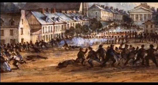 L'élection partielle dans le quartier ouest de Montréal en mai 1832 se conclue par la mort de trois partisans patriotes: Billet, Languedoc et Chauvin.